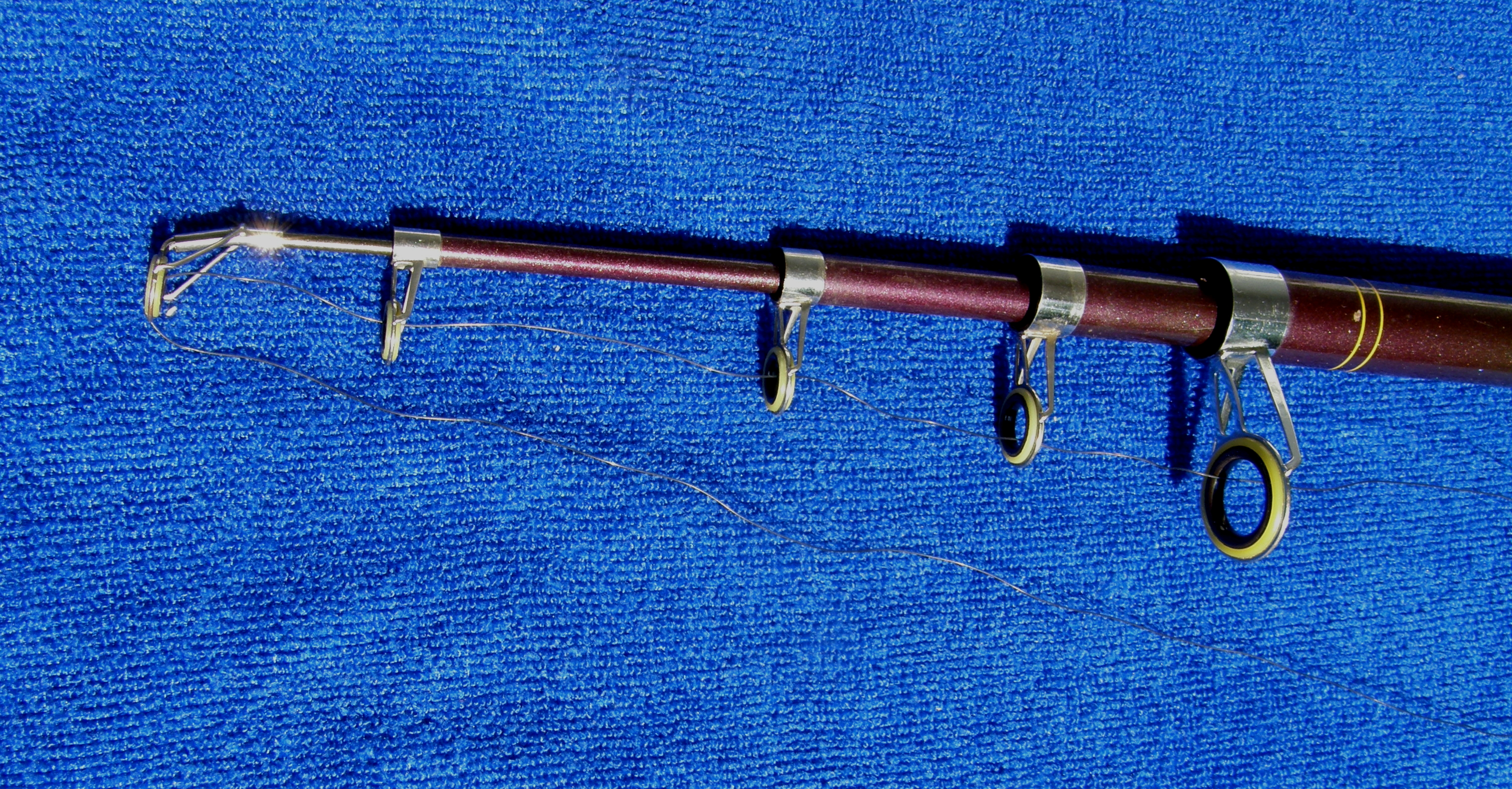 Teleskoprohre und Führungsringe einer Teleskopangel